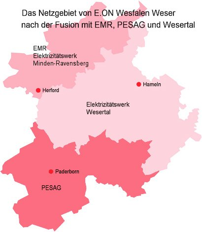 Netzgebiet von E.ON Westfalen Weser nach den Angaben der Netzversorger.